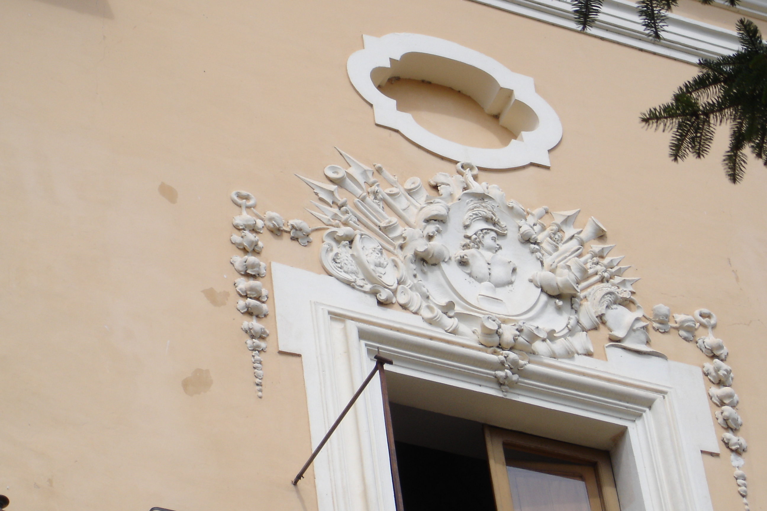 Dettaglio del Palazzo ducale di Alvito.